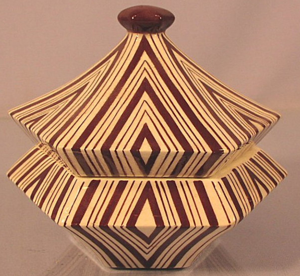 Keramikdose von Pavel Janák, Künstlergenossenschaft Artěl Prag, um 1920